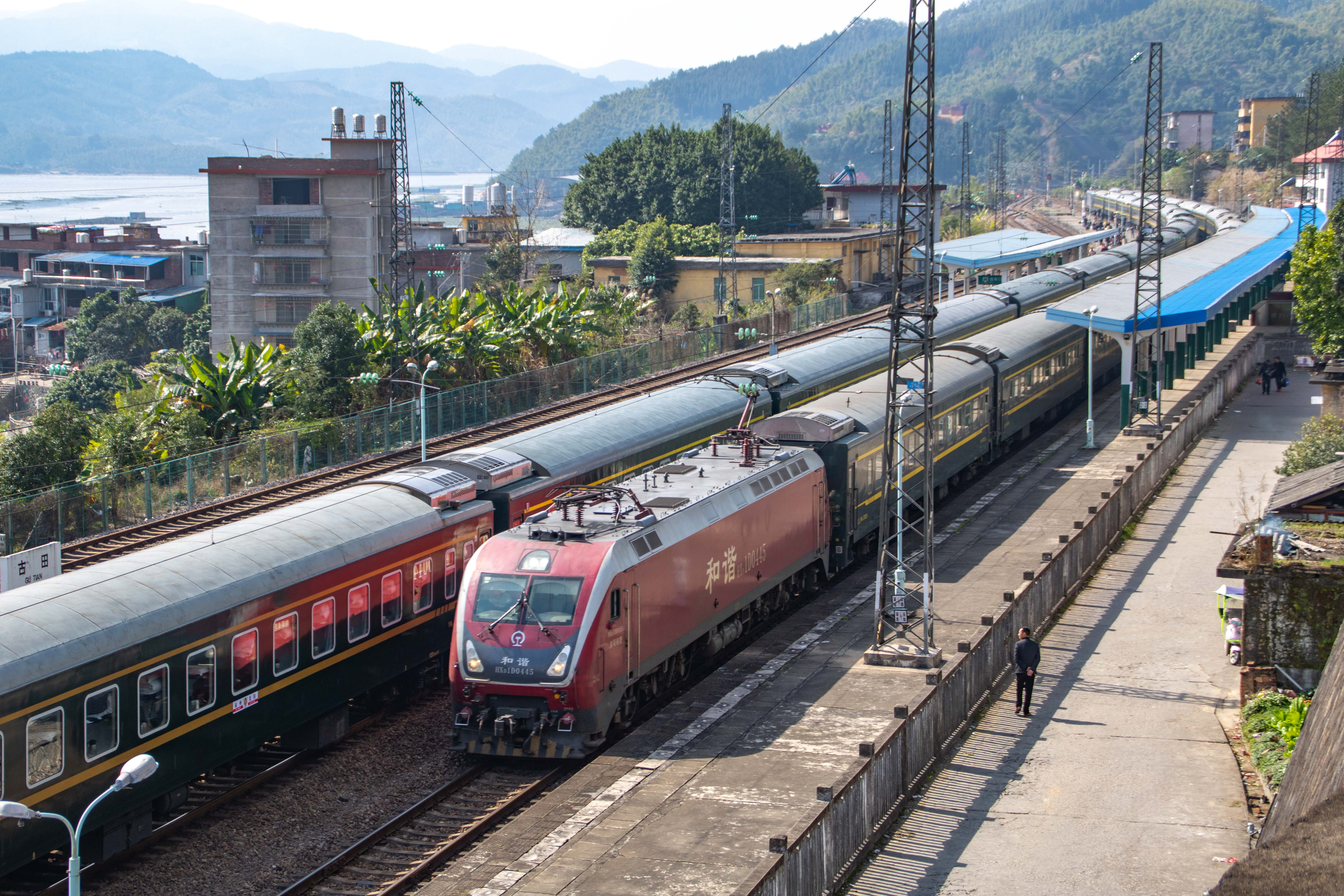 中文（中国大陆）: 繁忙的古田站